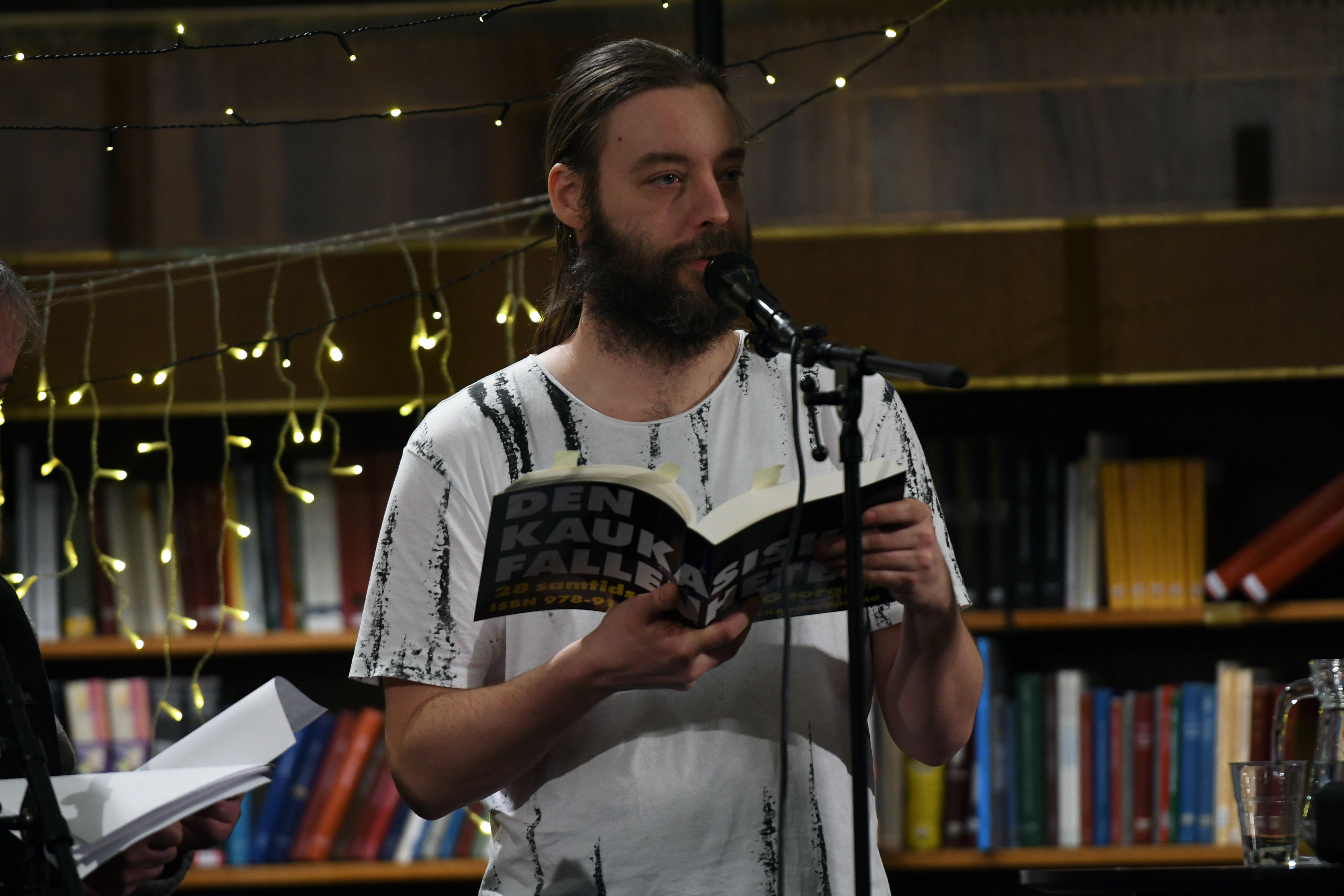 Poesimässan 2019, Stockholms stadsbibliotek. Översättaren Kristian Carlsson läser ur Paata Shamugias diktning.